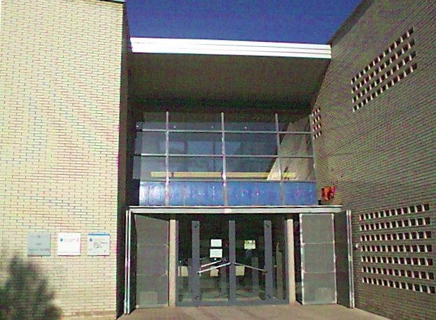 Puerta de entrada de un Centro de Atención Primaria Autor de la fotografía: Pixel